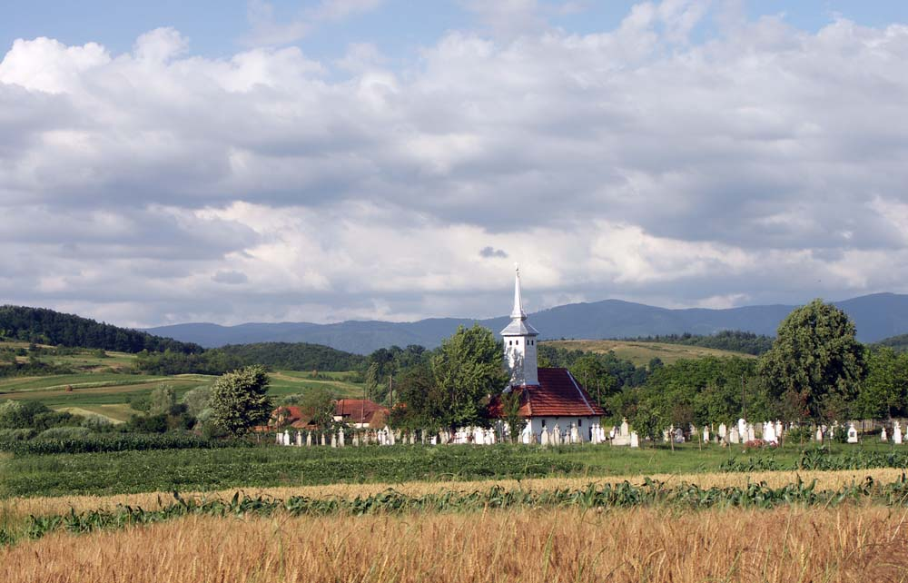 Biserica de lemn din Belejeni. Vedere peste grădini.